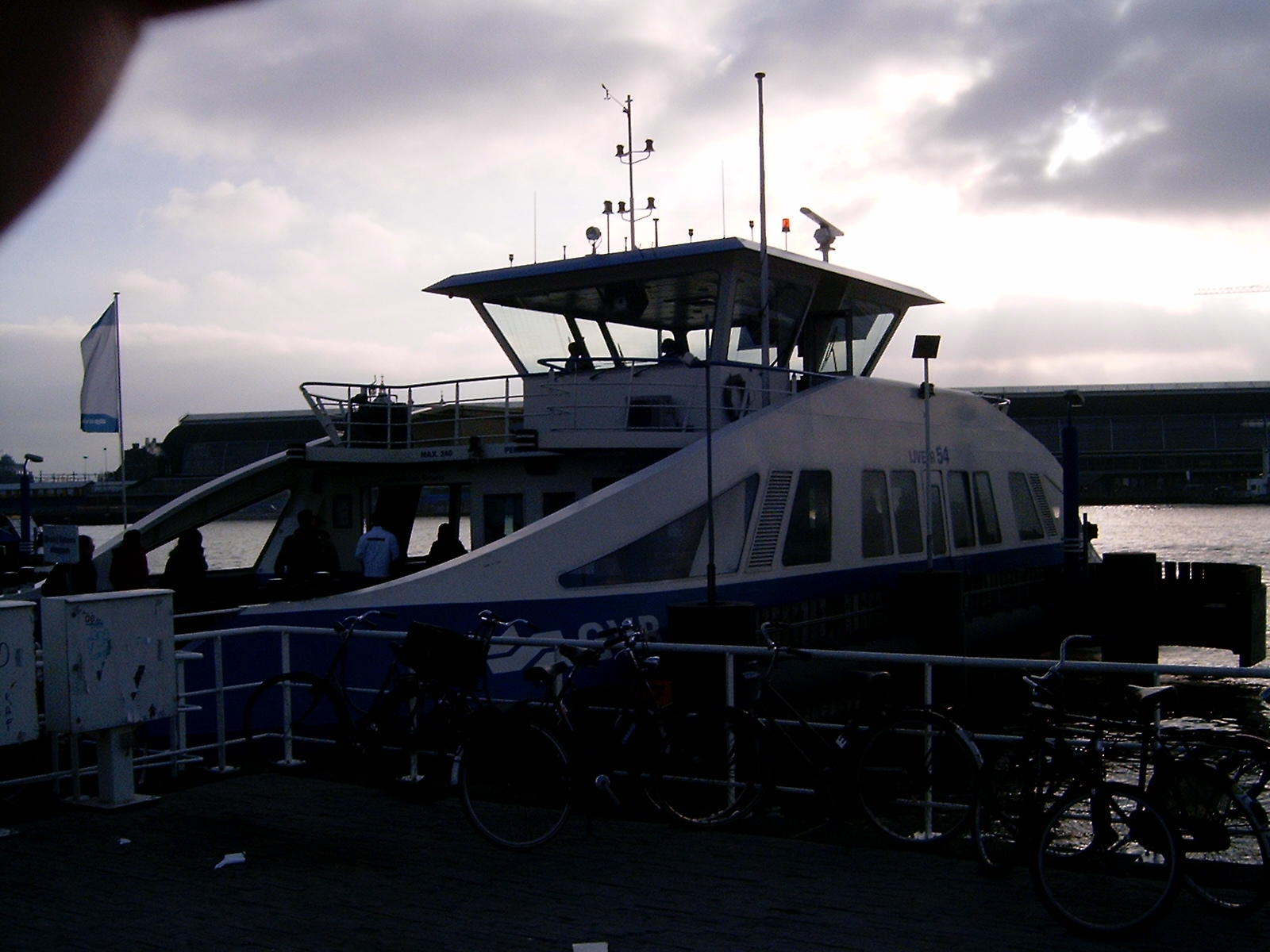 Pontje van Amsterdam Ferry in Amsterdam